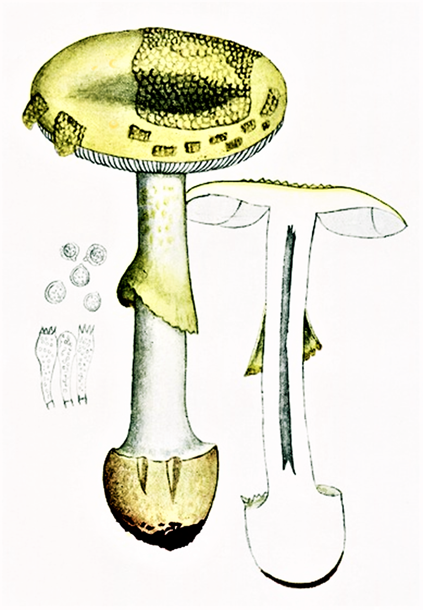 Giacomo Bresadola: Amanita mappa (Batsch) Bertill. (1866) heute Amanita citrina (Schaeff.) Pers. (1797)